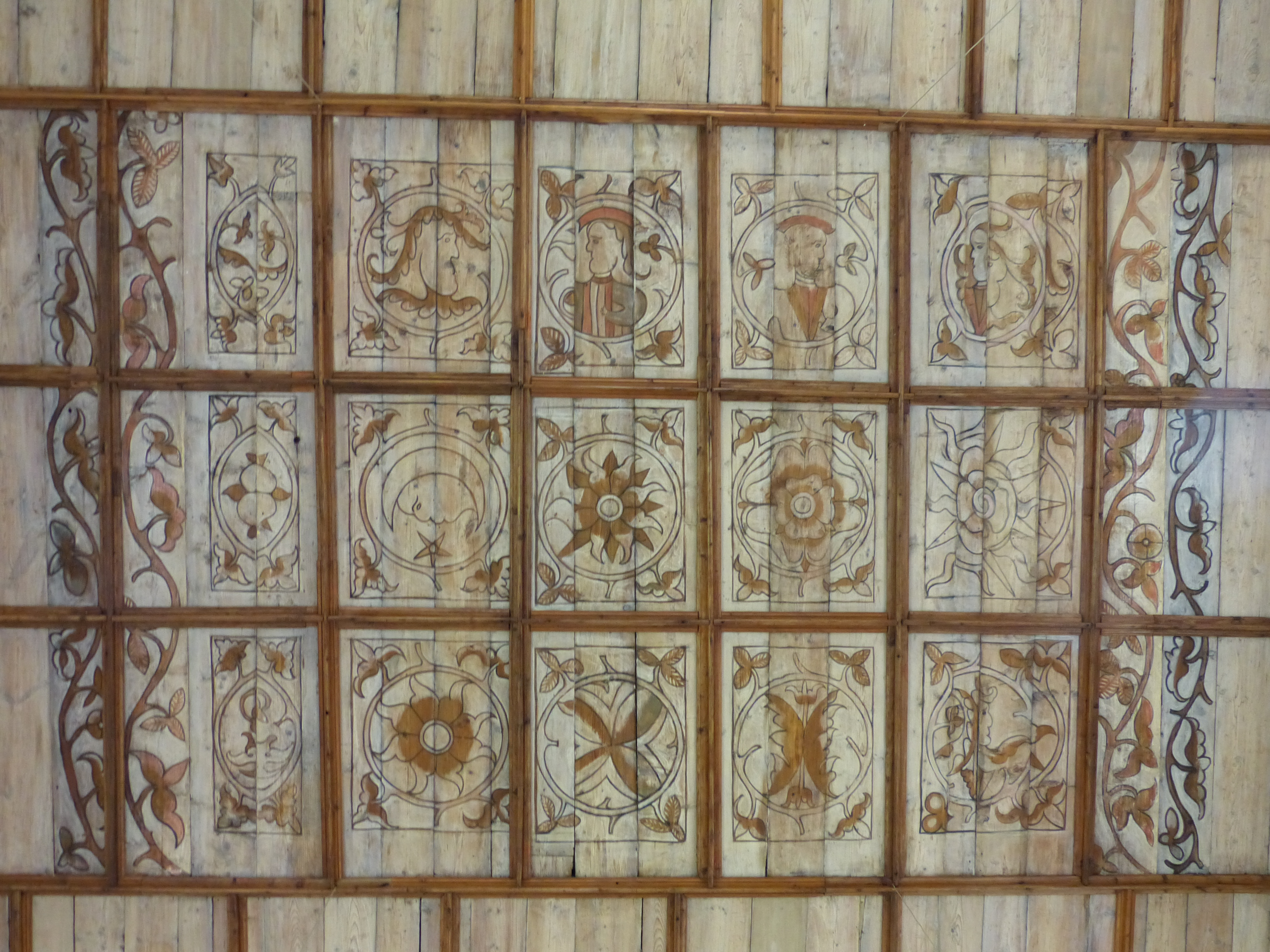 Filialkirche St. Leonhard, in Arndorf (Gemeinde Maria Saal, Kärnten): spätgotische Malerei an Holzdecke des Langhauses